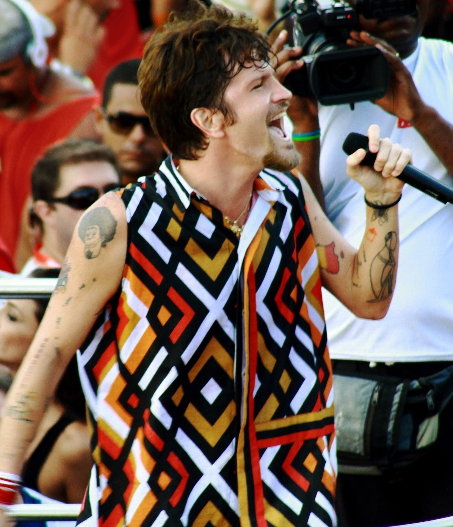 Saulo Fernandes canta em seu último Carnaval na Banda Eva no Circuito Campo Grande - Domingo 10.02 - Foto: Tatiana Azeviche - Sertur